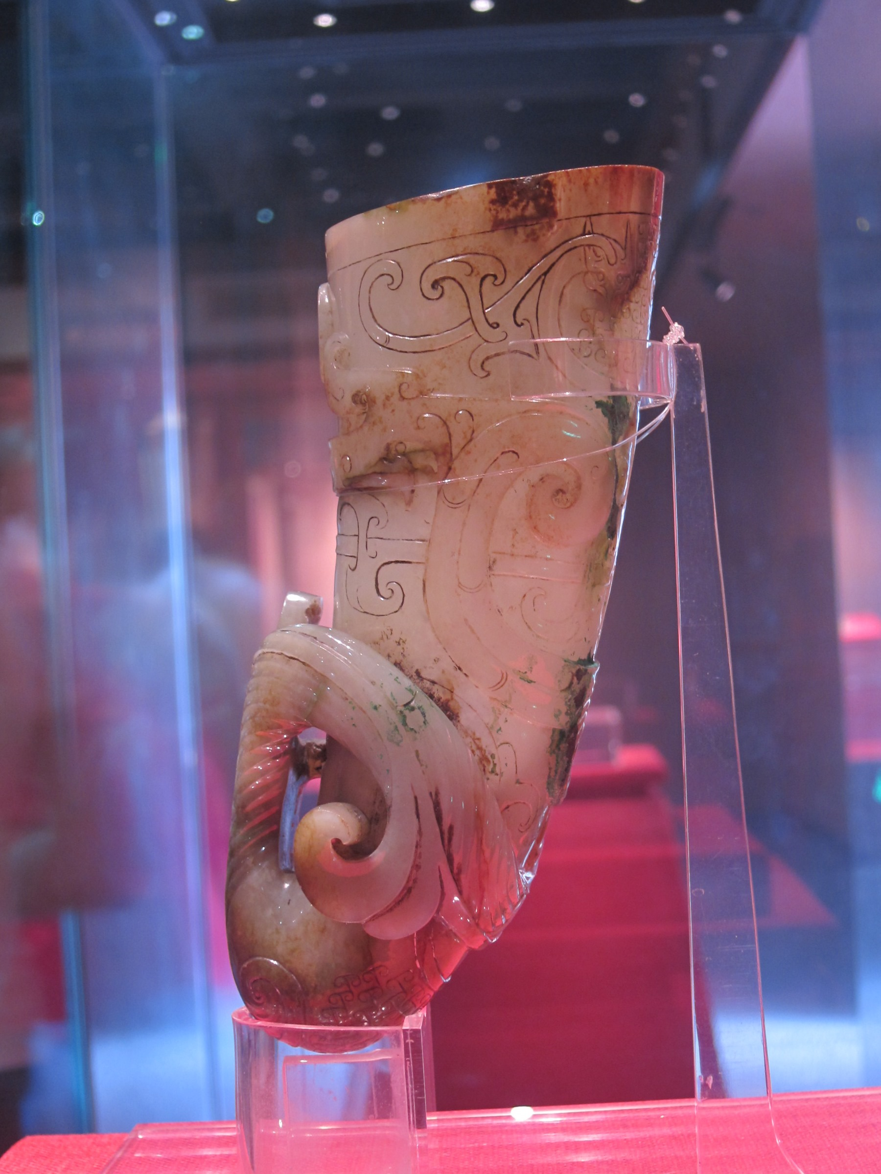 1983年6月廣州越秀區象崗出土,該玉杯出土自墓主棺槨頭箱,出土時有殘留下葬時包裹的紅紗.用一整塊青玉雕而成,微透明,外形呈犀牛角造型,口橢圓,口微折,腹中空,通長18.4厘米,口徑5.9-6.7厘米,口緣厚0.2厘米,重372.7克.集所有玉器雕琢技藝於一身,是漢代玉器里的精品.